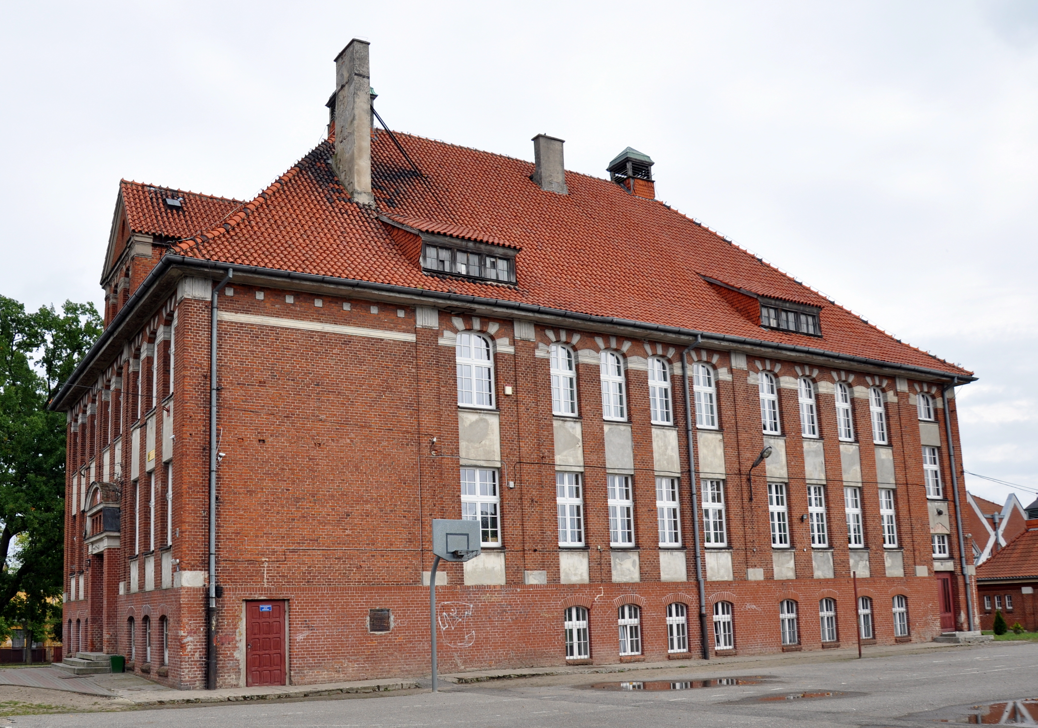 Kisielice, szkoła, 1925